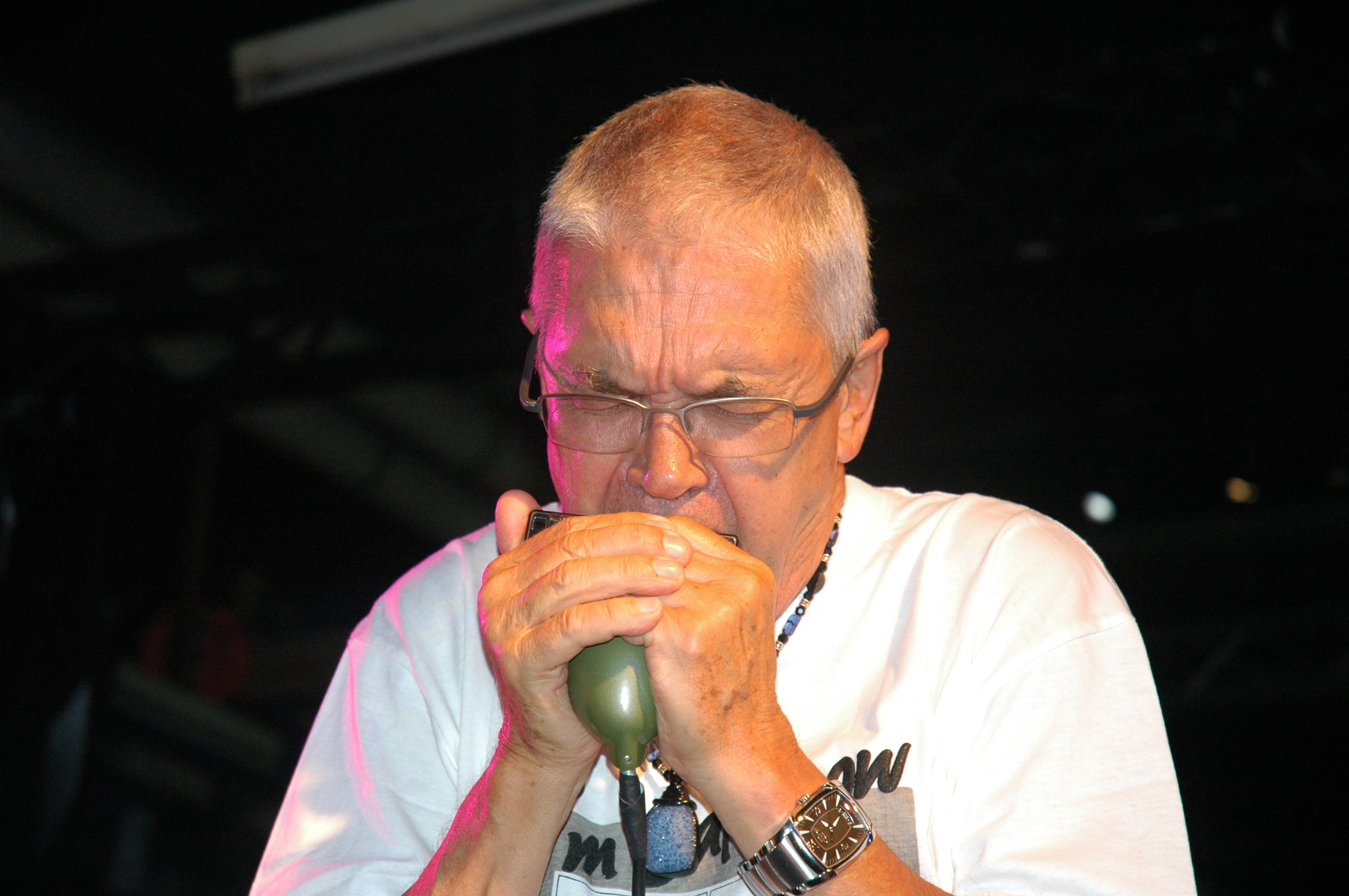 Claude Nobs (Montreux Jazz Festival director)